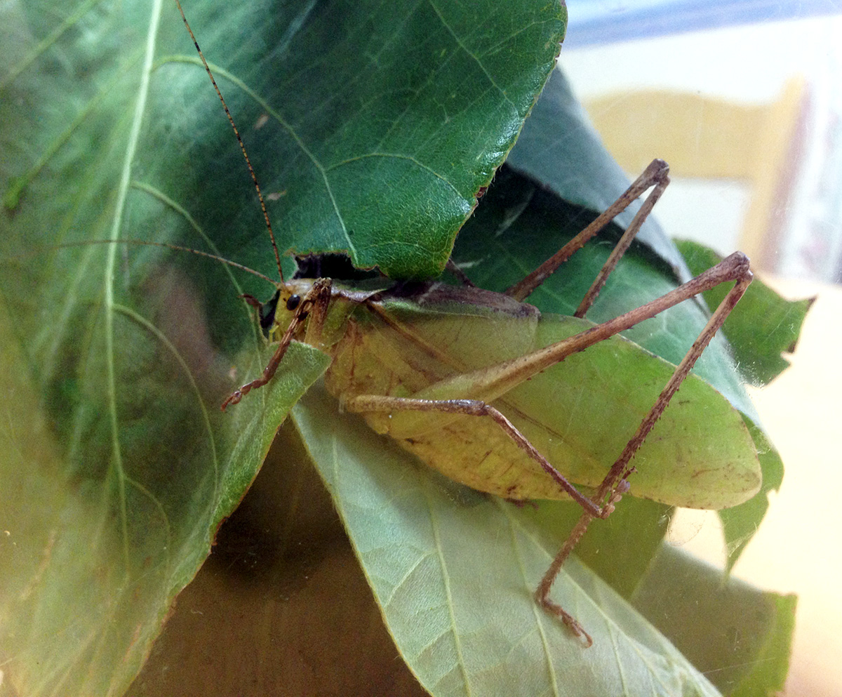 クツワムシ（雄）緑型